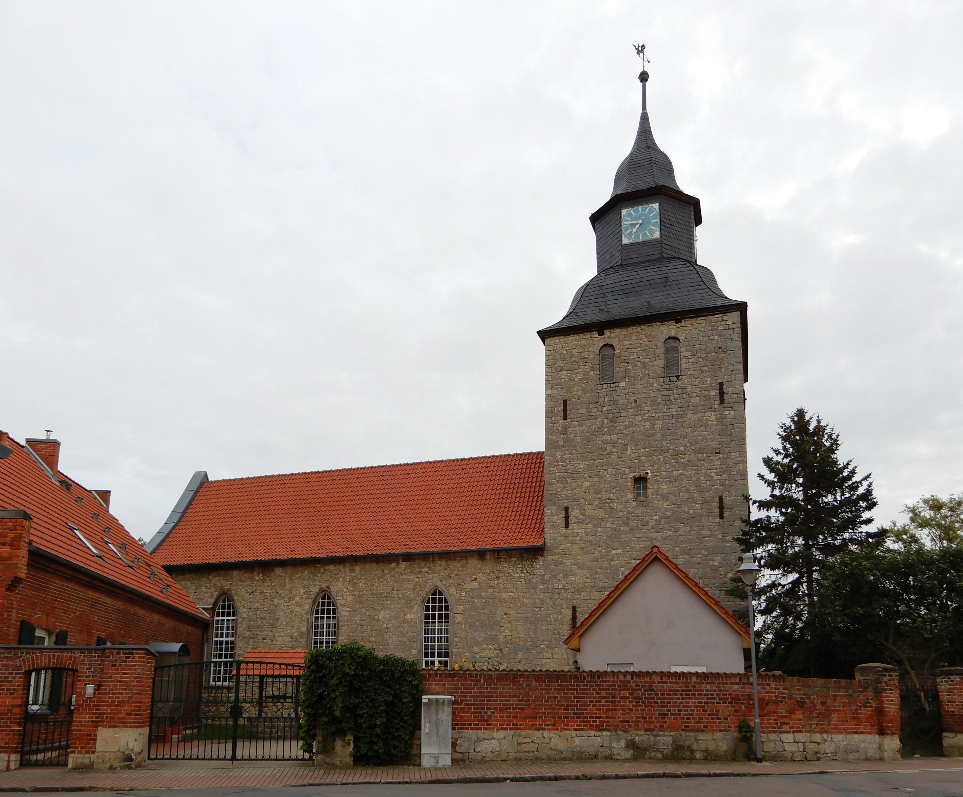 Kirche St. Andreas in Sinsleben, Ortsteil von Ermsleben